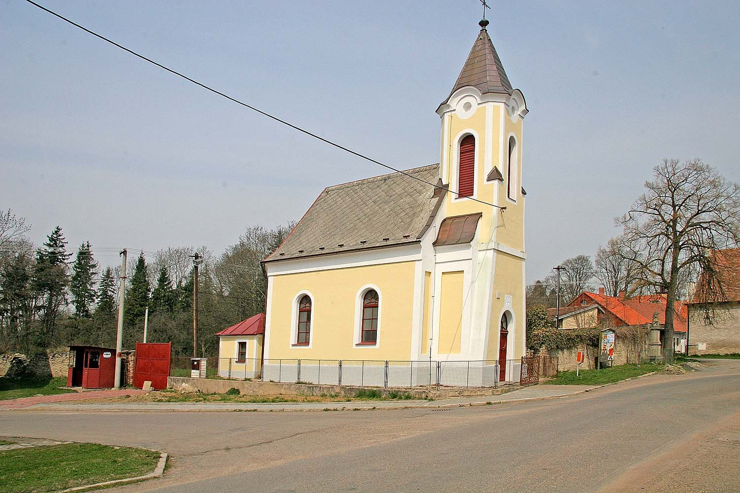 kaple v obci Přestavlky, okres Chrudim